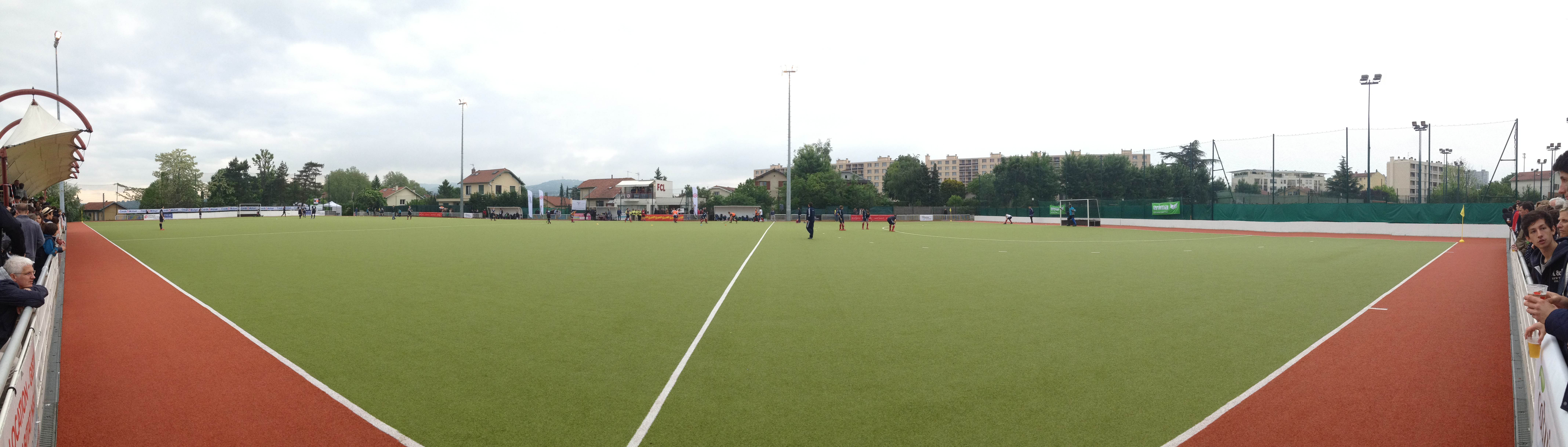 Panoramique du Stade Georges-Corbel (Caluire-et-Cuire) durant l'échauffement de la finale du championnat de France masculin de hockey sur gazon 2013.